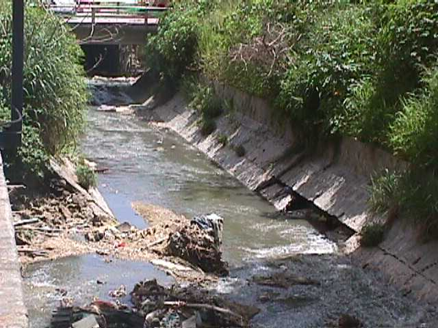 Quebrada La Guairita a nivel del KFC La Tirinidad detrás del edificio del KFC La Trinidad a una altura de 975 msnm